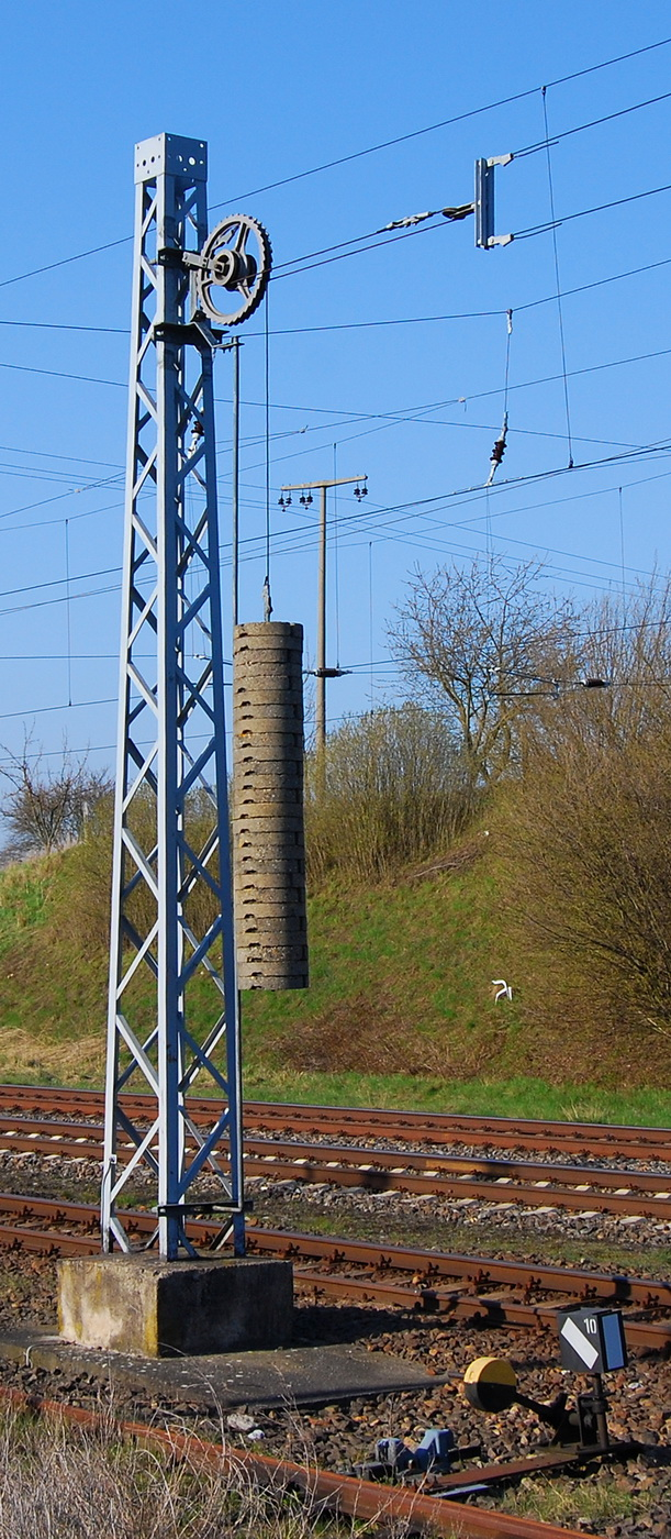 Gewichtsspannvorrichtung DR-Bauart im Bahnhof Vollrathsruhe